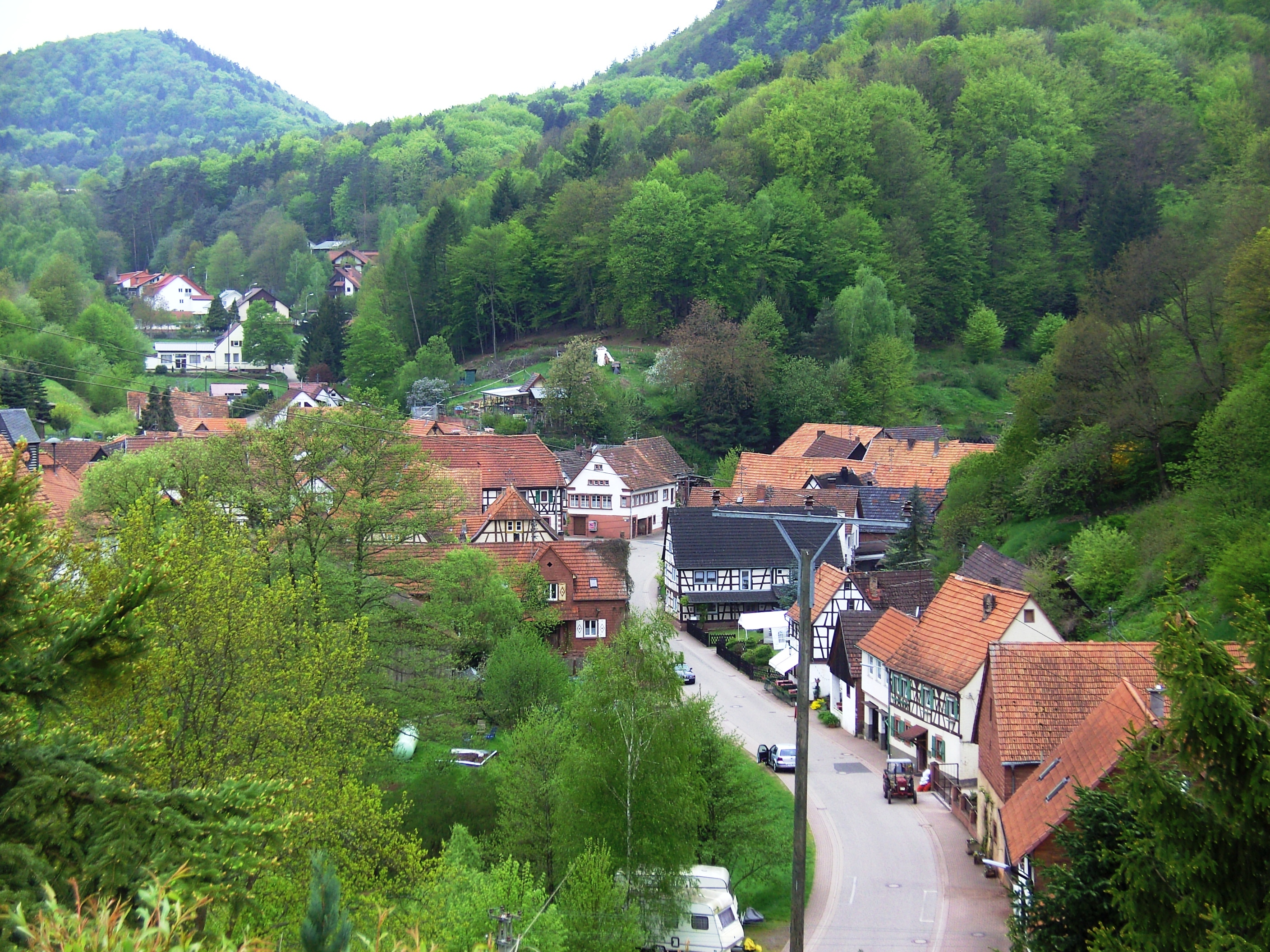 Blick auf die August-Becker Straße in Oberschlettenbach